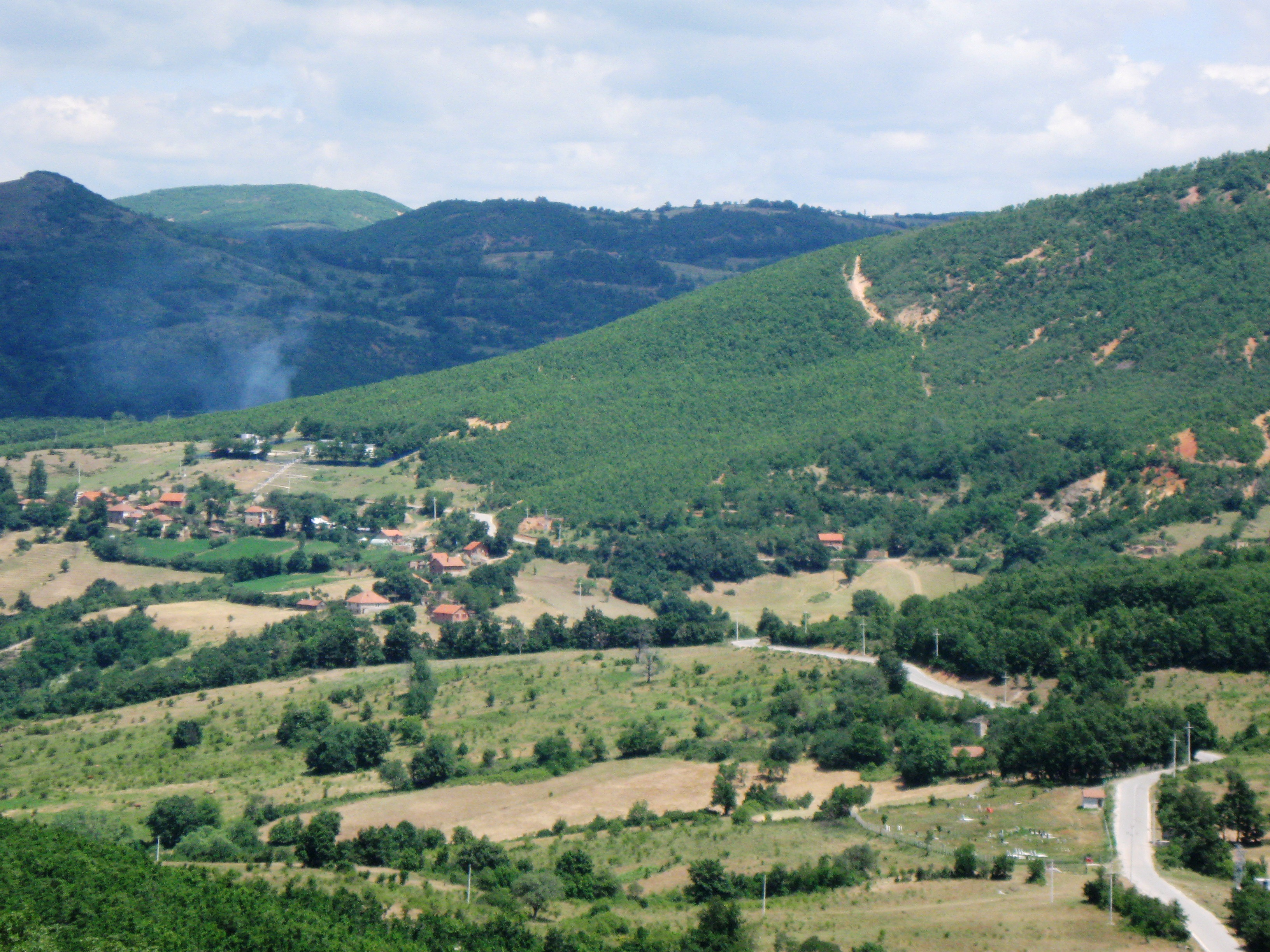 Snimak Radosava Stojanovica